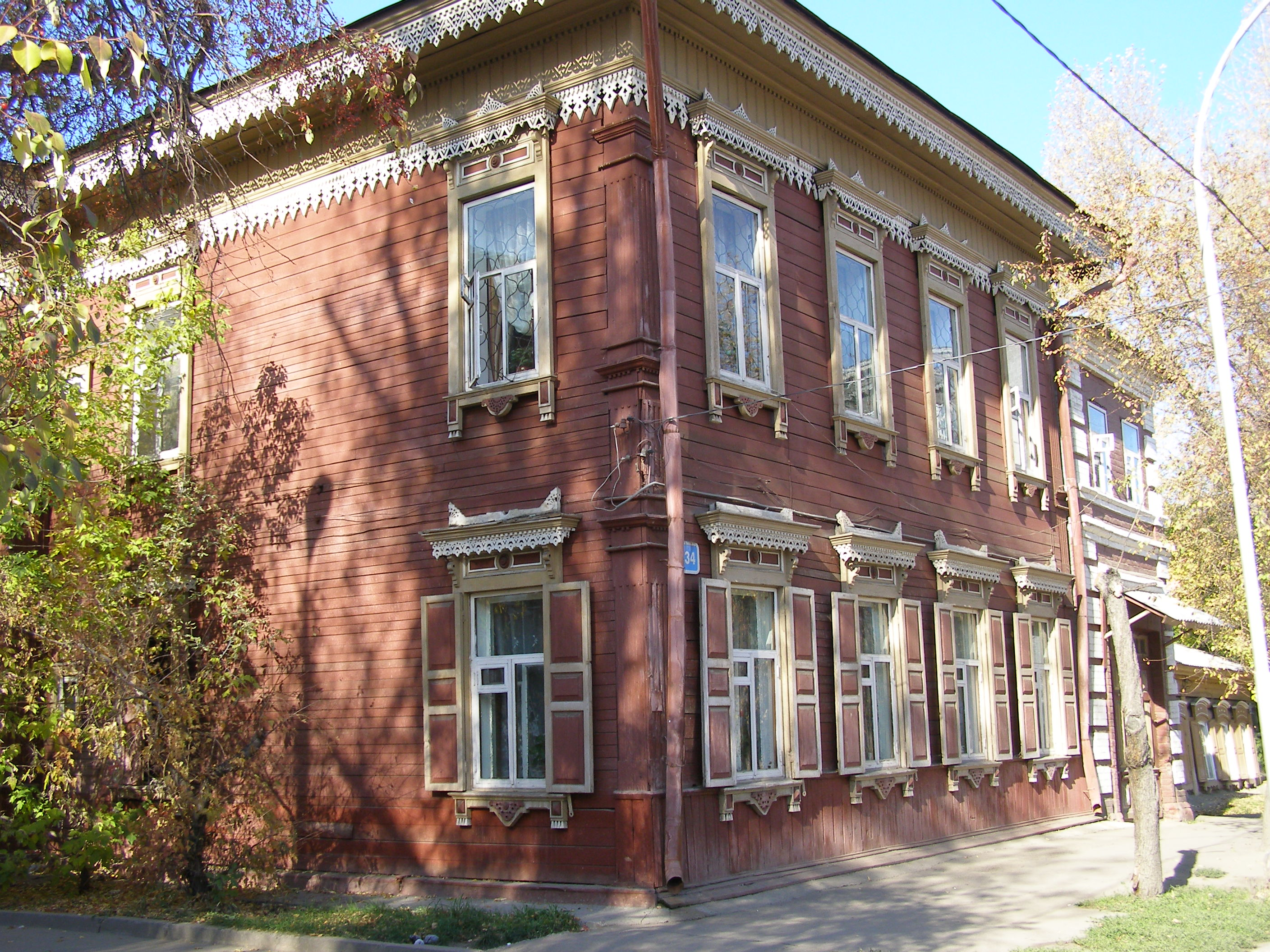 Главный дом (Иркутская область, Иркутск, марата улица, 34)